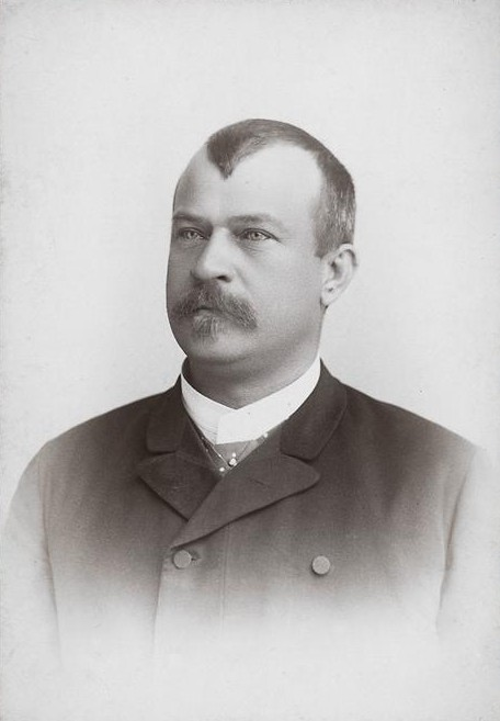 Václav Viktorín, český operní pěvec, barytonista a pedagog